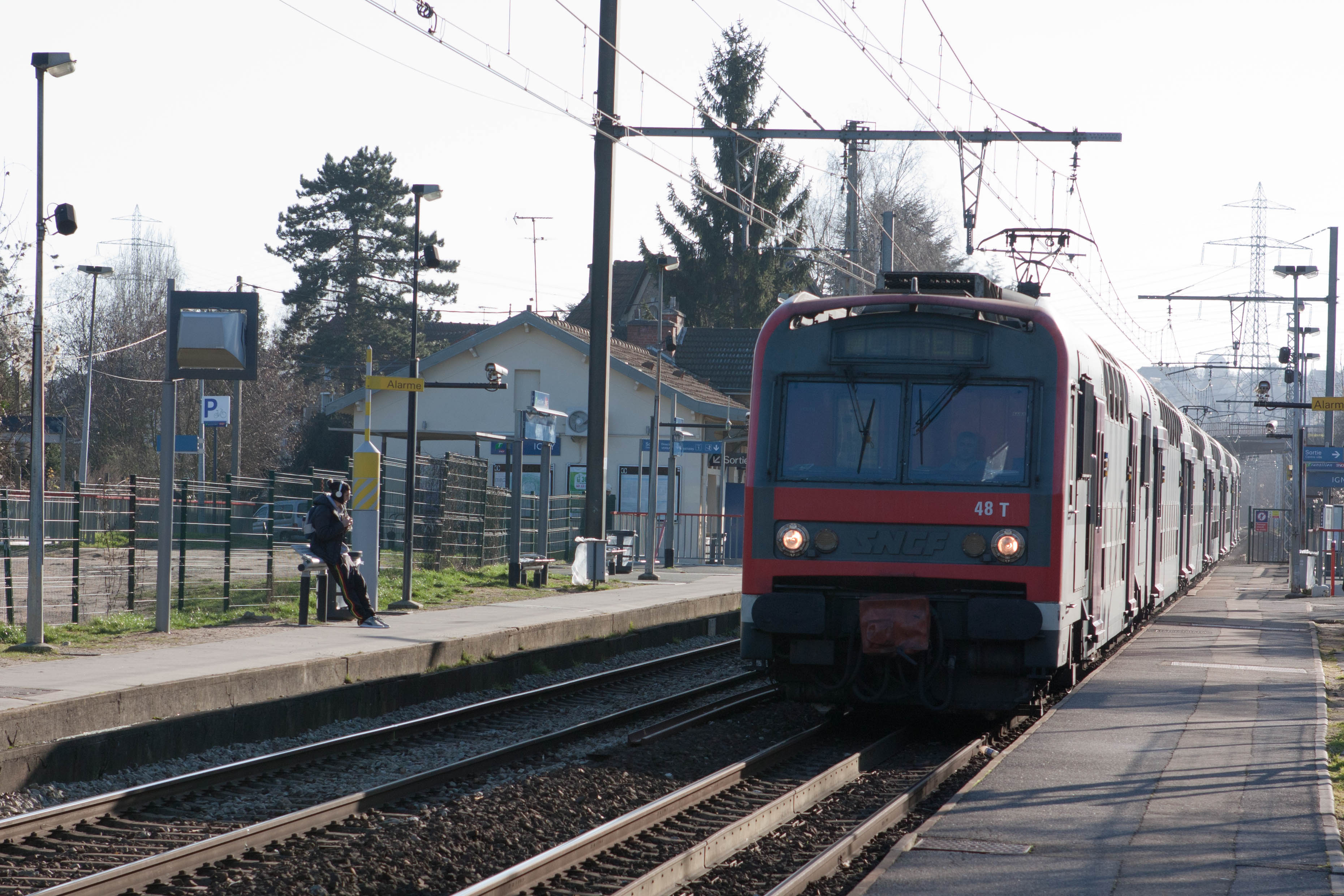 Gare d'Igny, Ligne C du RER, Igny, Essonne, France